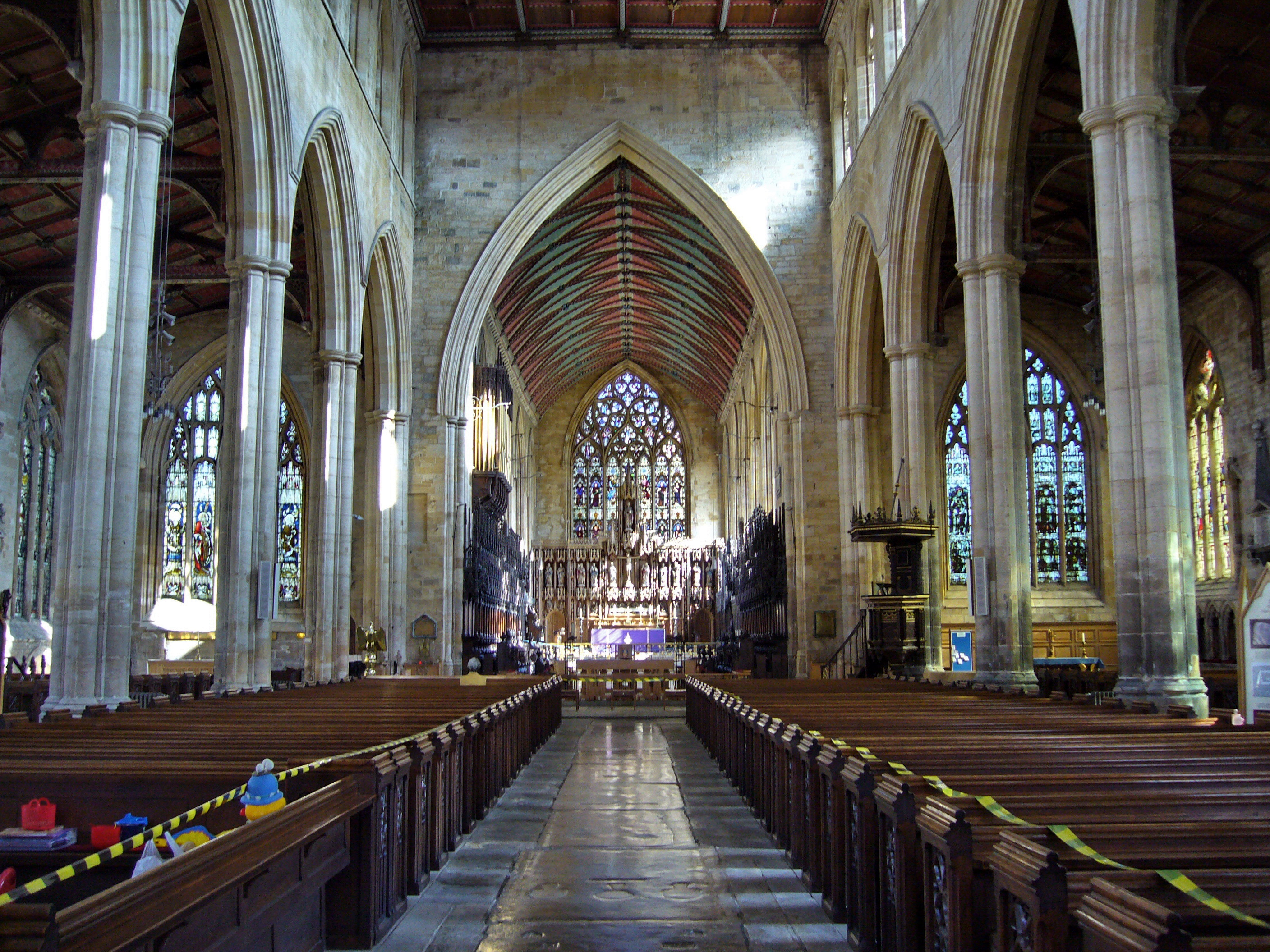 Boston